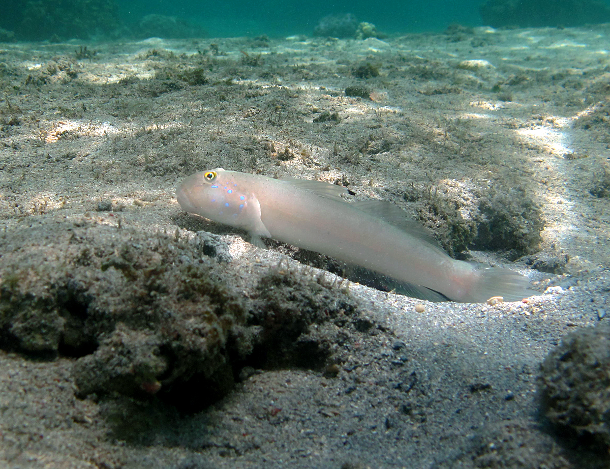 Un gobie à six taches (Valenciennea sexguttata) à la Réunion.